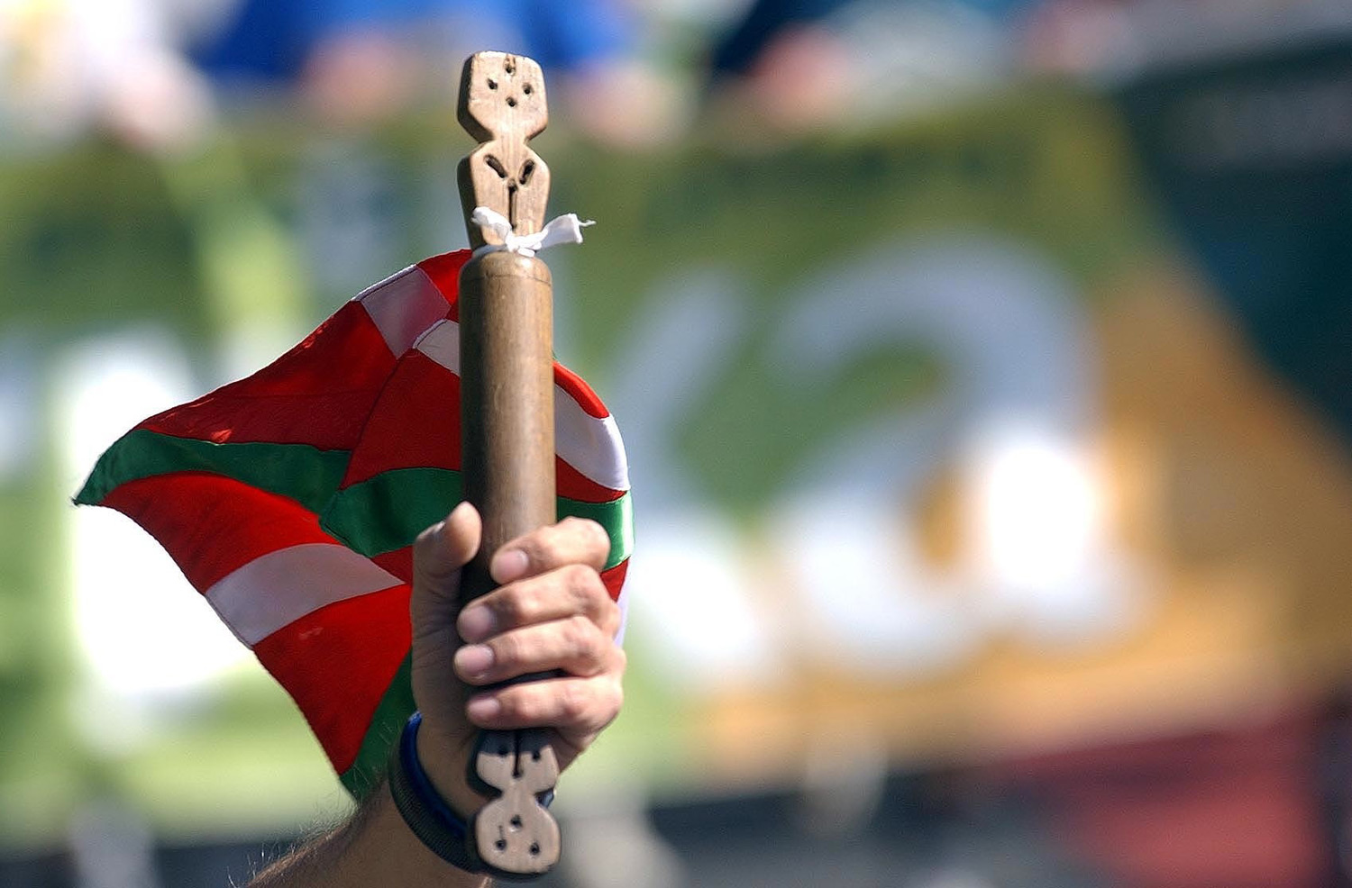 Korrika-ren lekukoa. Remigio Mendibururen "eskultura"